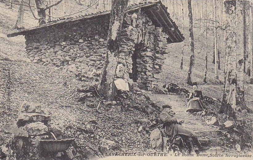 Lavacherie sur Ourthe, Ardennes belges, Province du Luxembourg, Chapelle de Sainte Ode et sa source ferrugineuse.